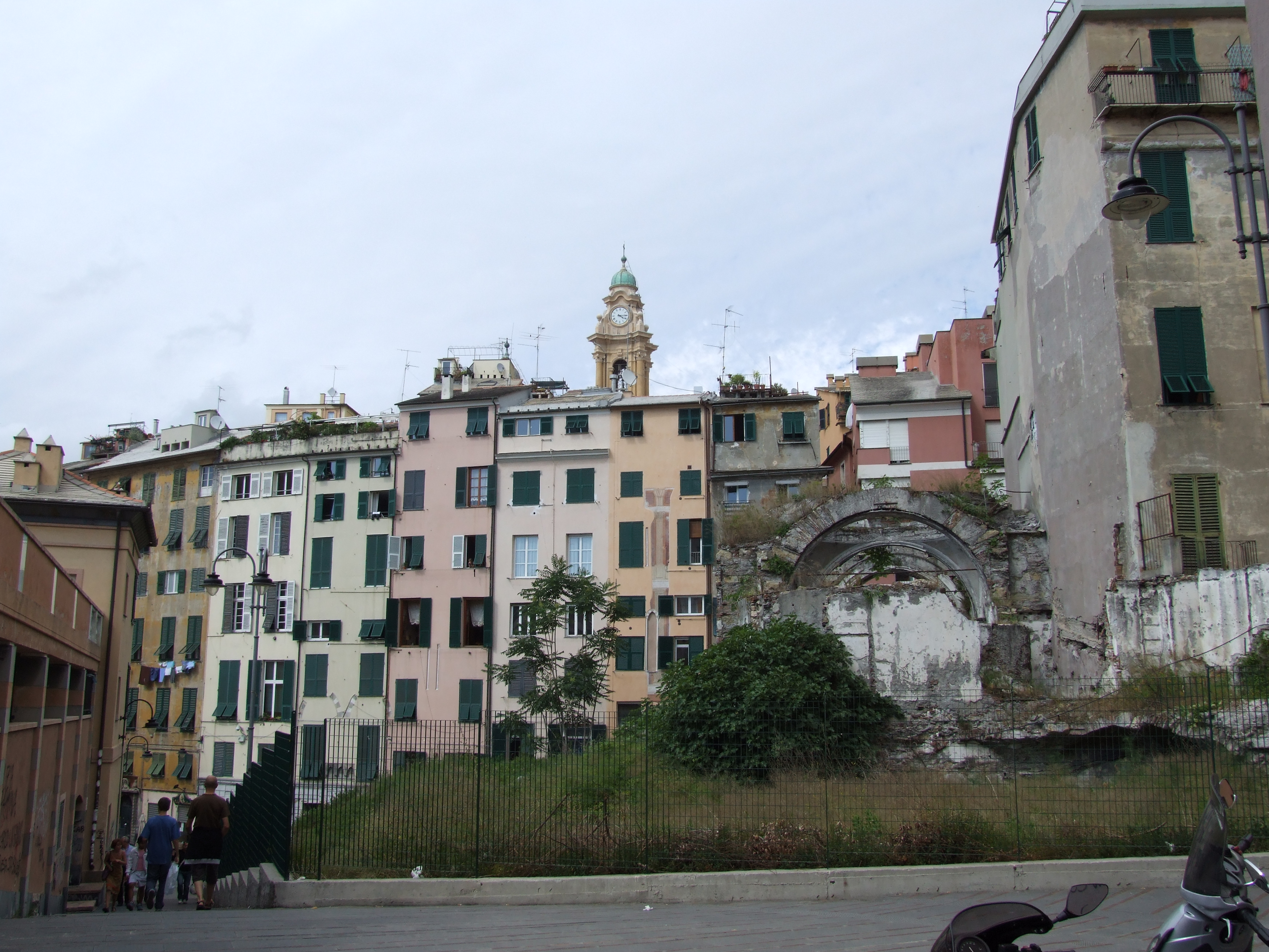 Genoa